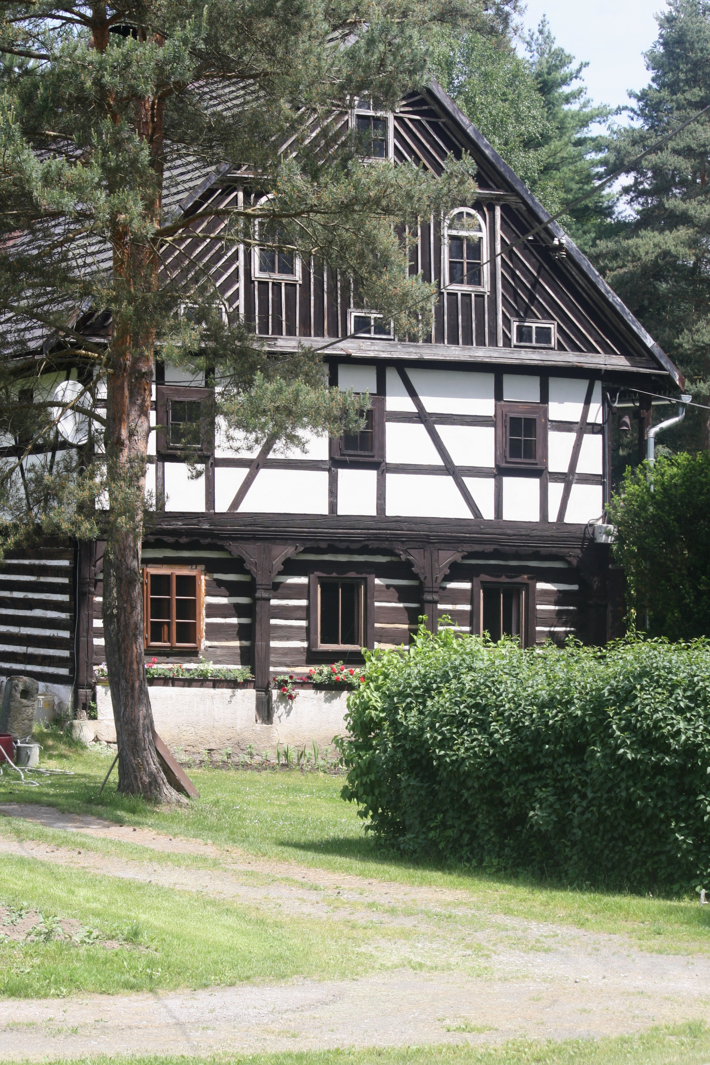 Obrok